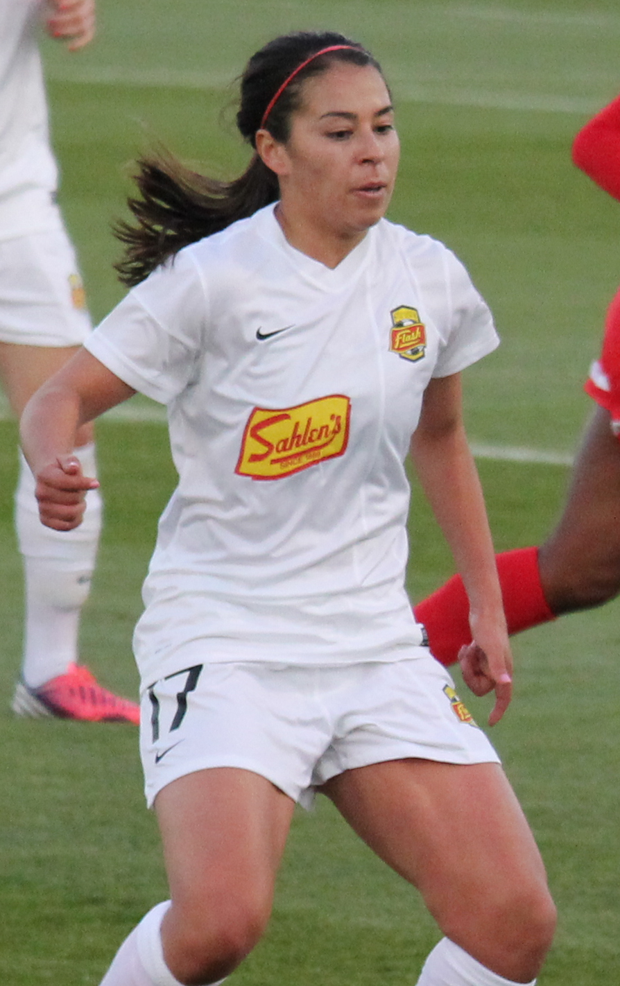 Veronica Perez (Western New York Flash)